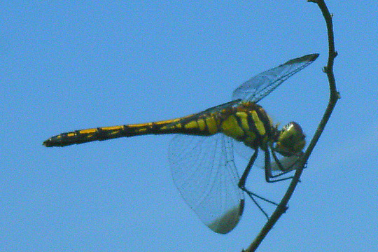 Sympetrum infuscatum. Libellulidae, Anisoptera.